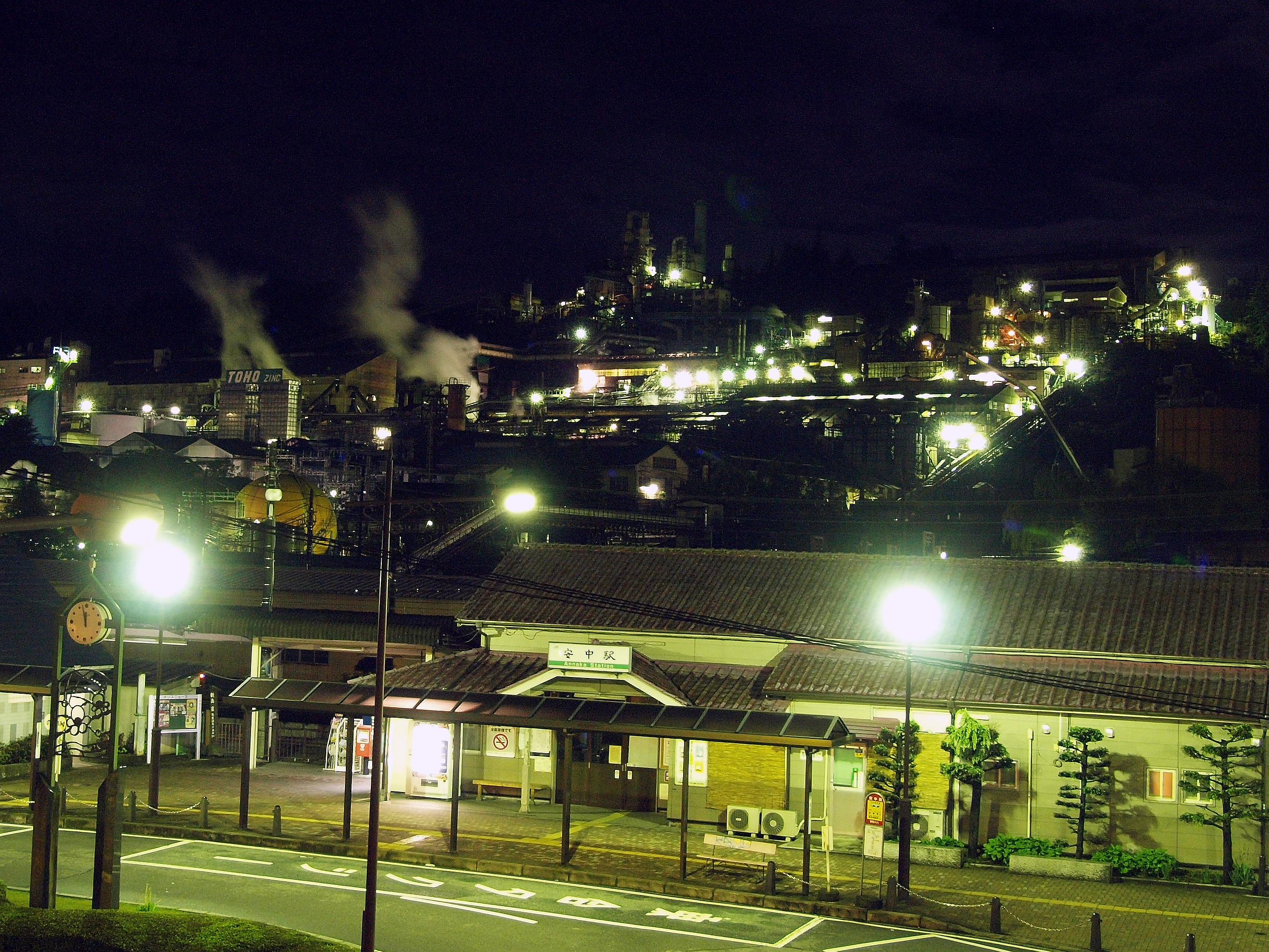 Toho Zinc Annaka , Gunma